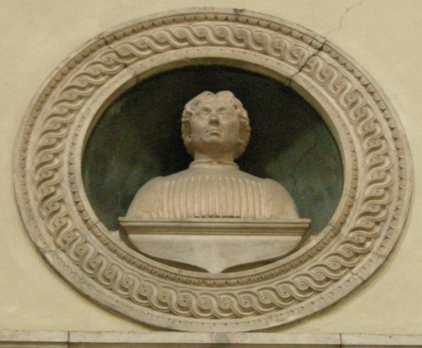 Chiesa di Santa Maria del Fiore a Firenze. Tondo ottocentesco, opera di Ulisse Cambi, con busto di Antonio Squarcialupi, opera di Benedetto da Maiano.